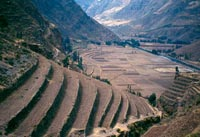 Runa Simi: Antikunapi pata-patakuna. Achka papakunatas tarpurqanku.